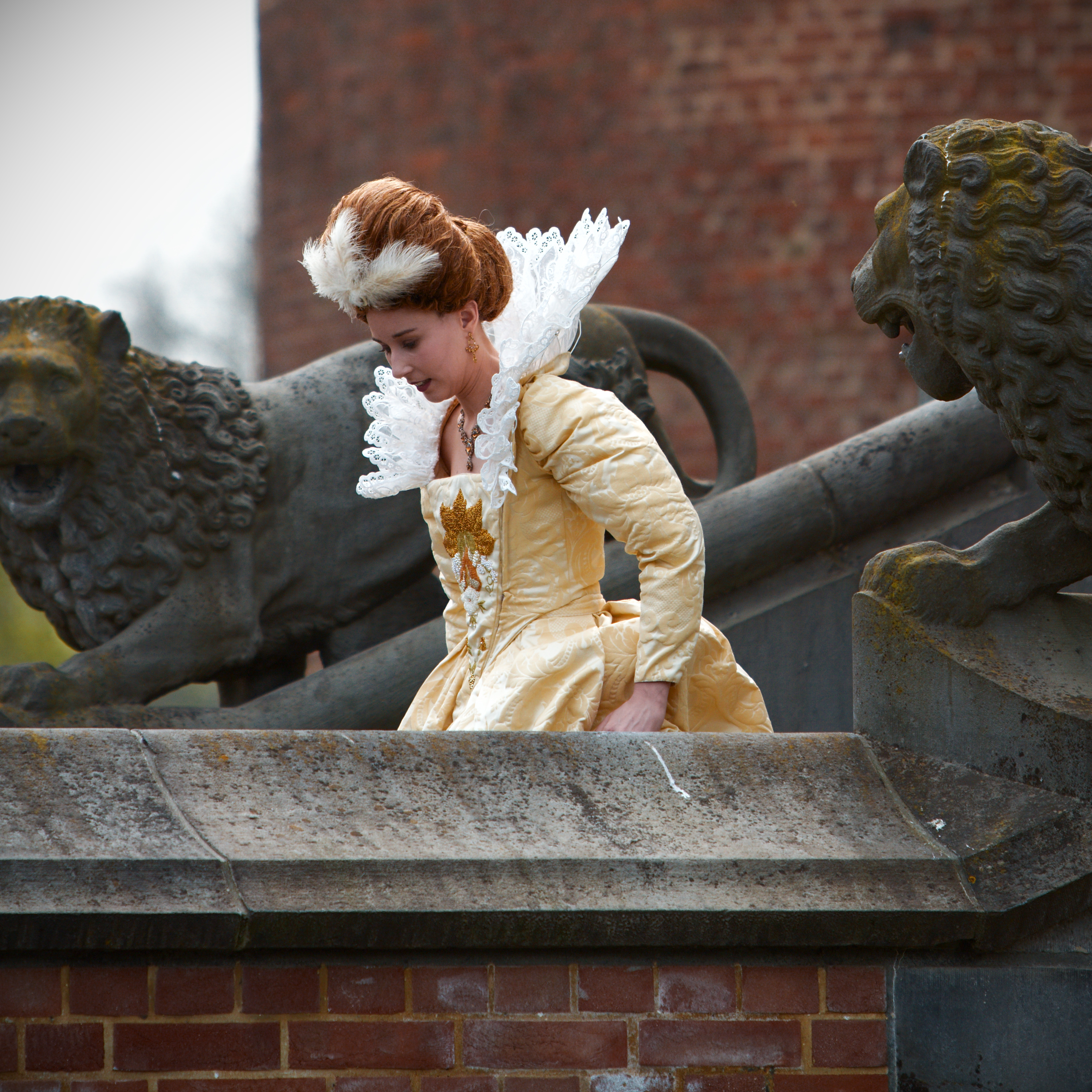 Don't let your love wait.... run!!